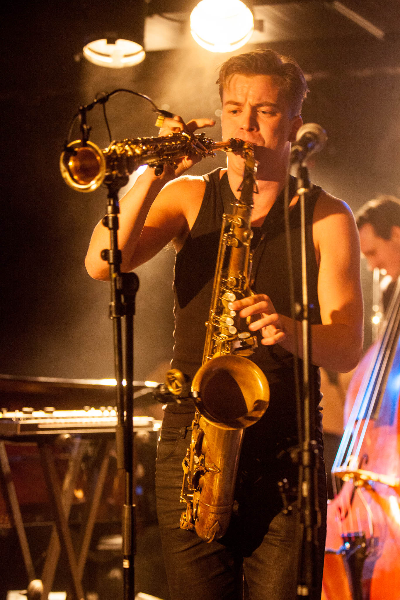 Marius Neset i Jazzkamikaze opptrer på Sinus i Bodø under Bodø Jazz Open 2013